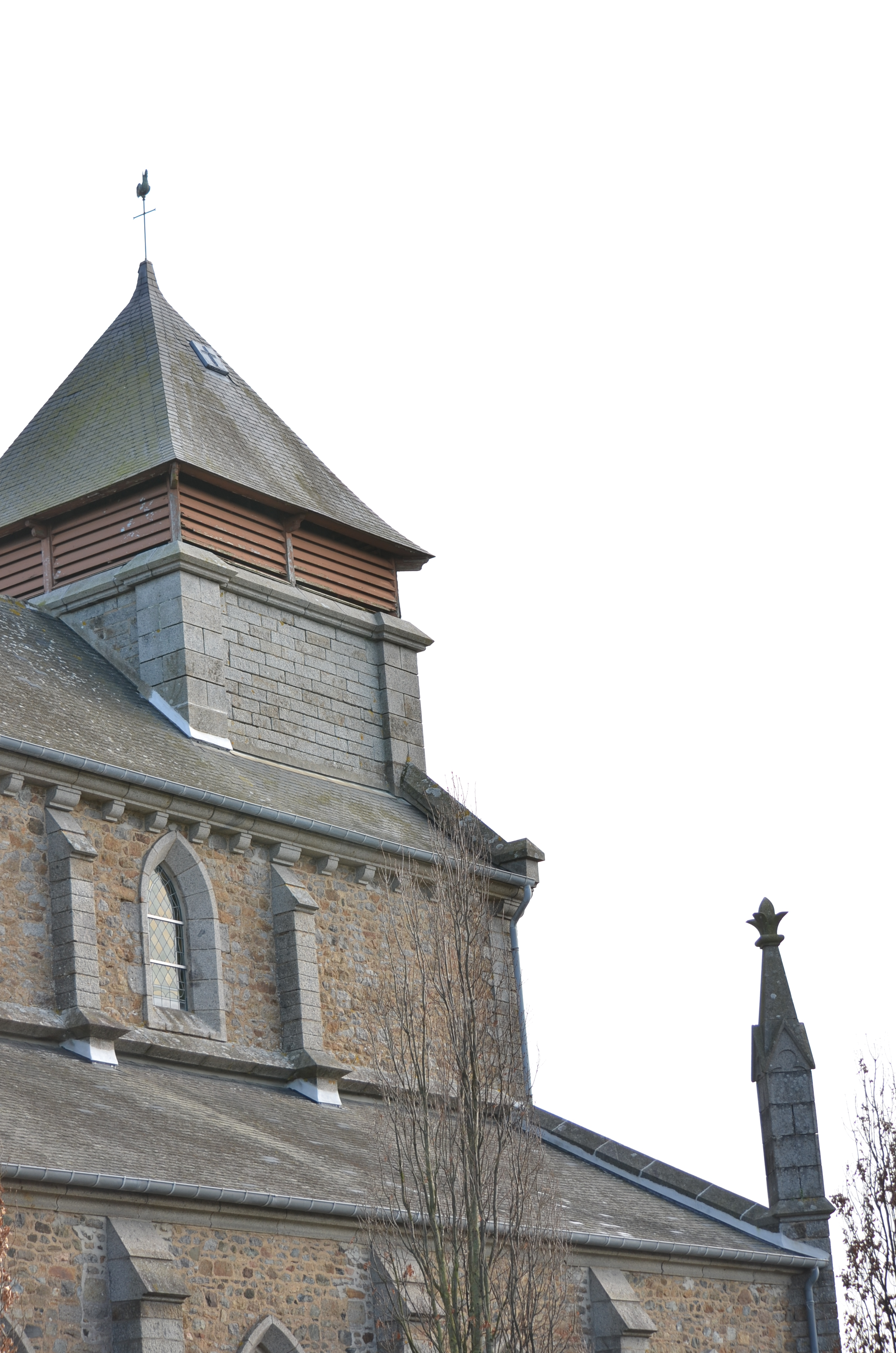 L'église Saint-Pierre de TREGUEUX fut construite par Messieurs RENOUARD et PIGNOREL. Elle fut achevée en 1882.